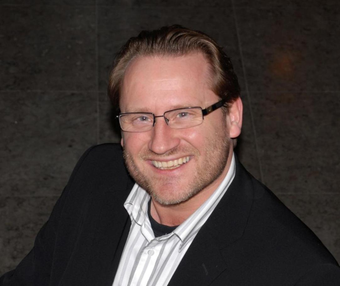 Norwegian politician Finn Egil Holm